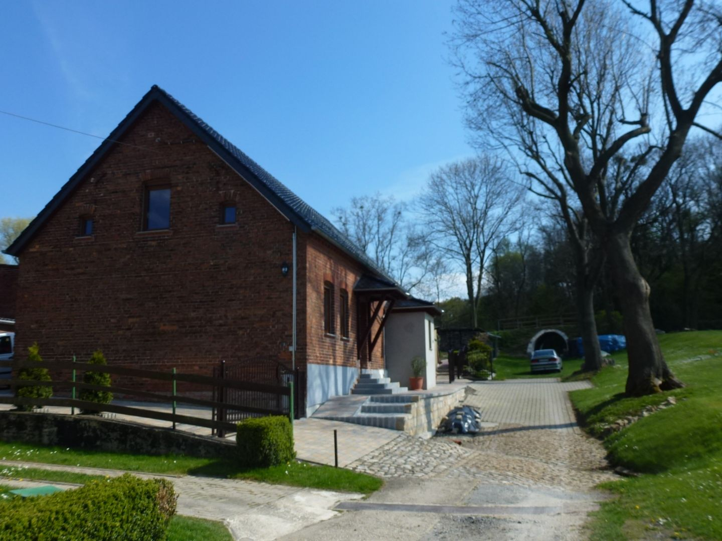 Ehem. Bahnlinie südlich von Seidewitz